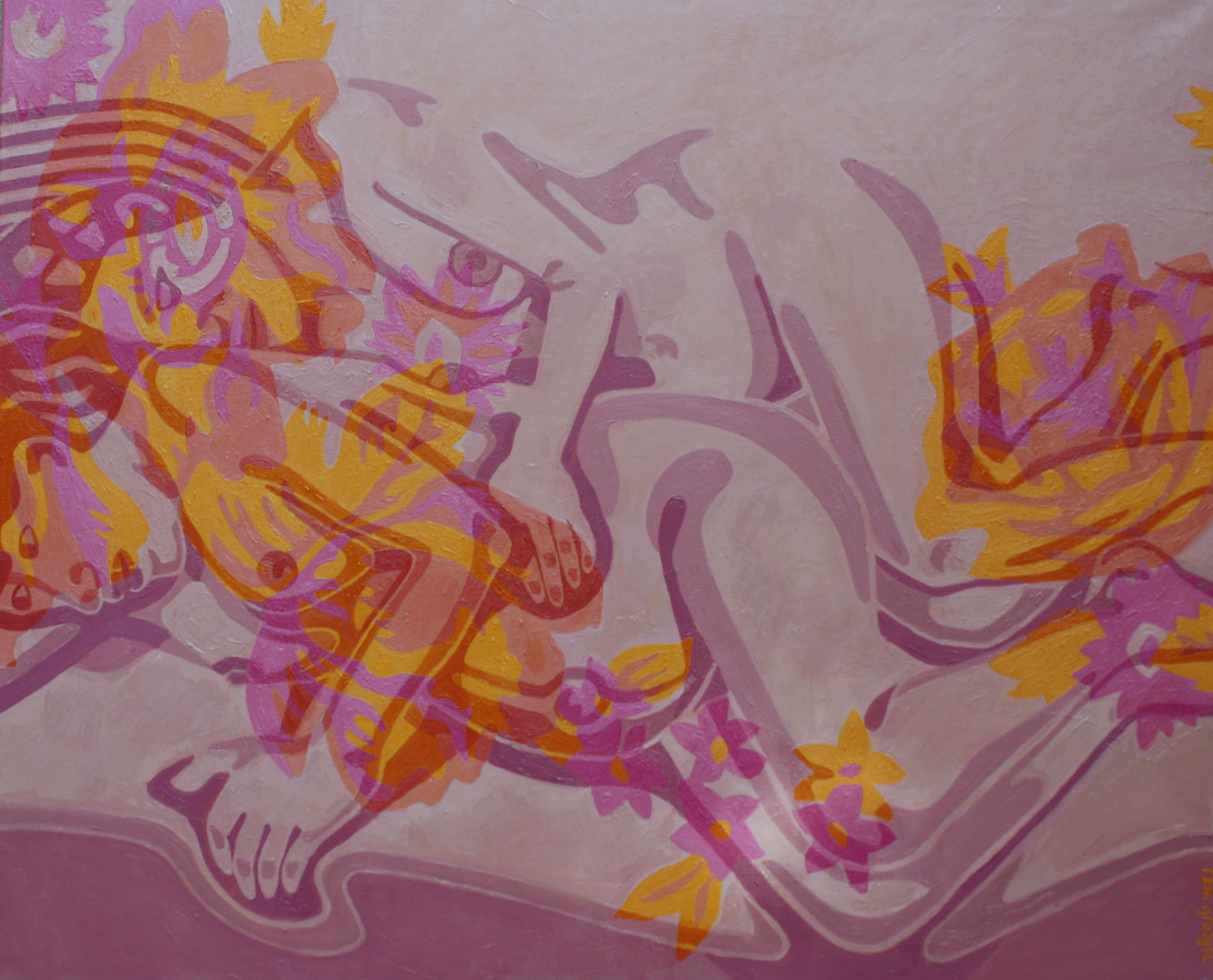 Nomi Tannhauser, Anne and Alice (after Freud) (2)